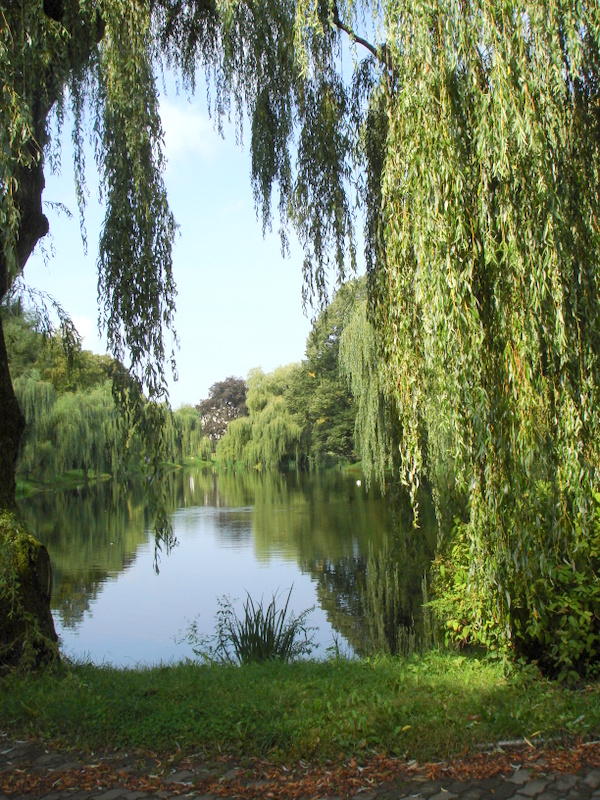 Koszalin, Park przy Amfiteatrze